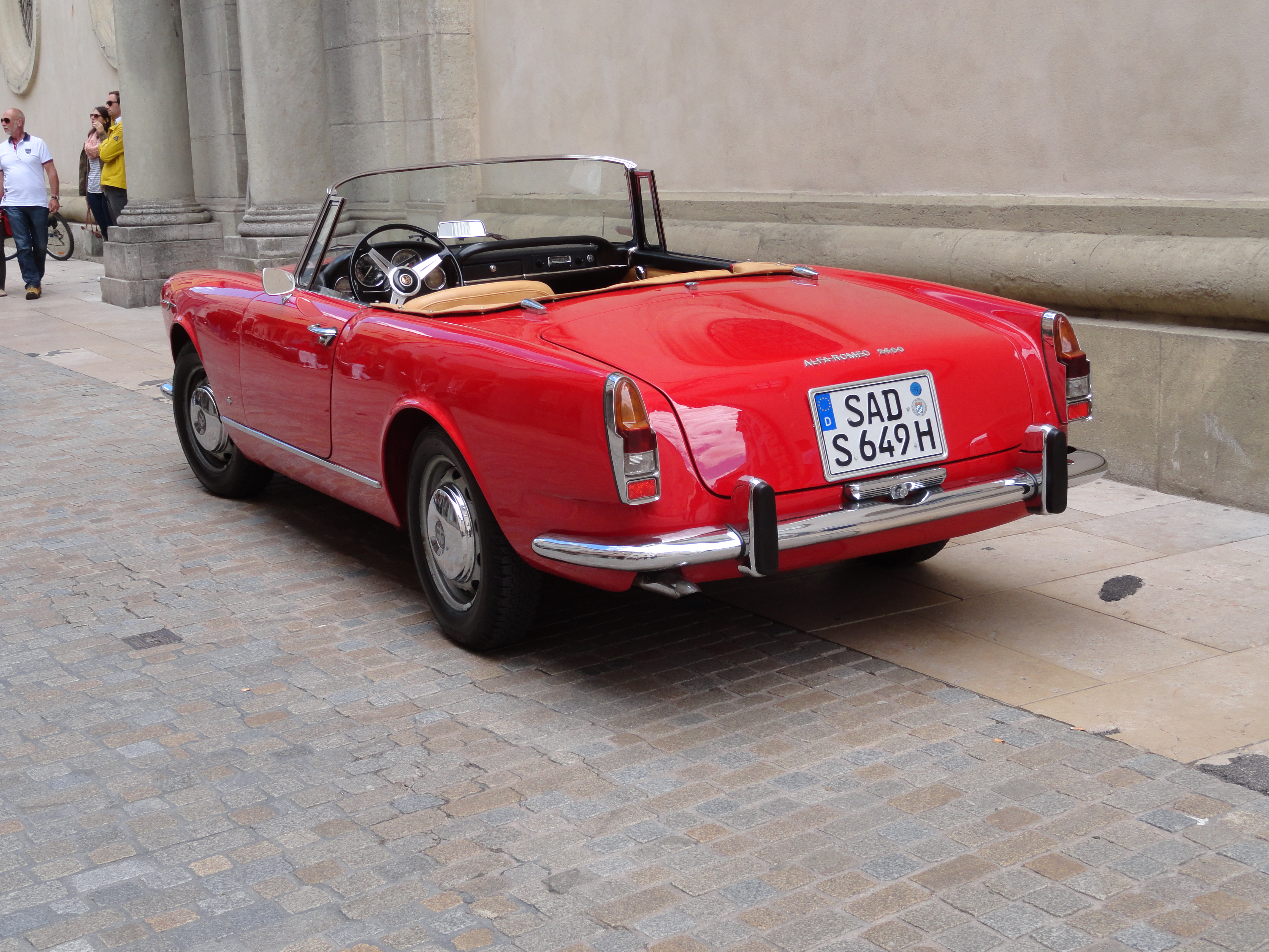 Alfa Romeo 2600 Heck